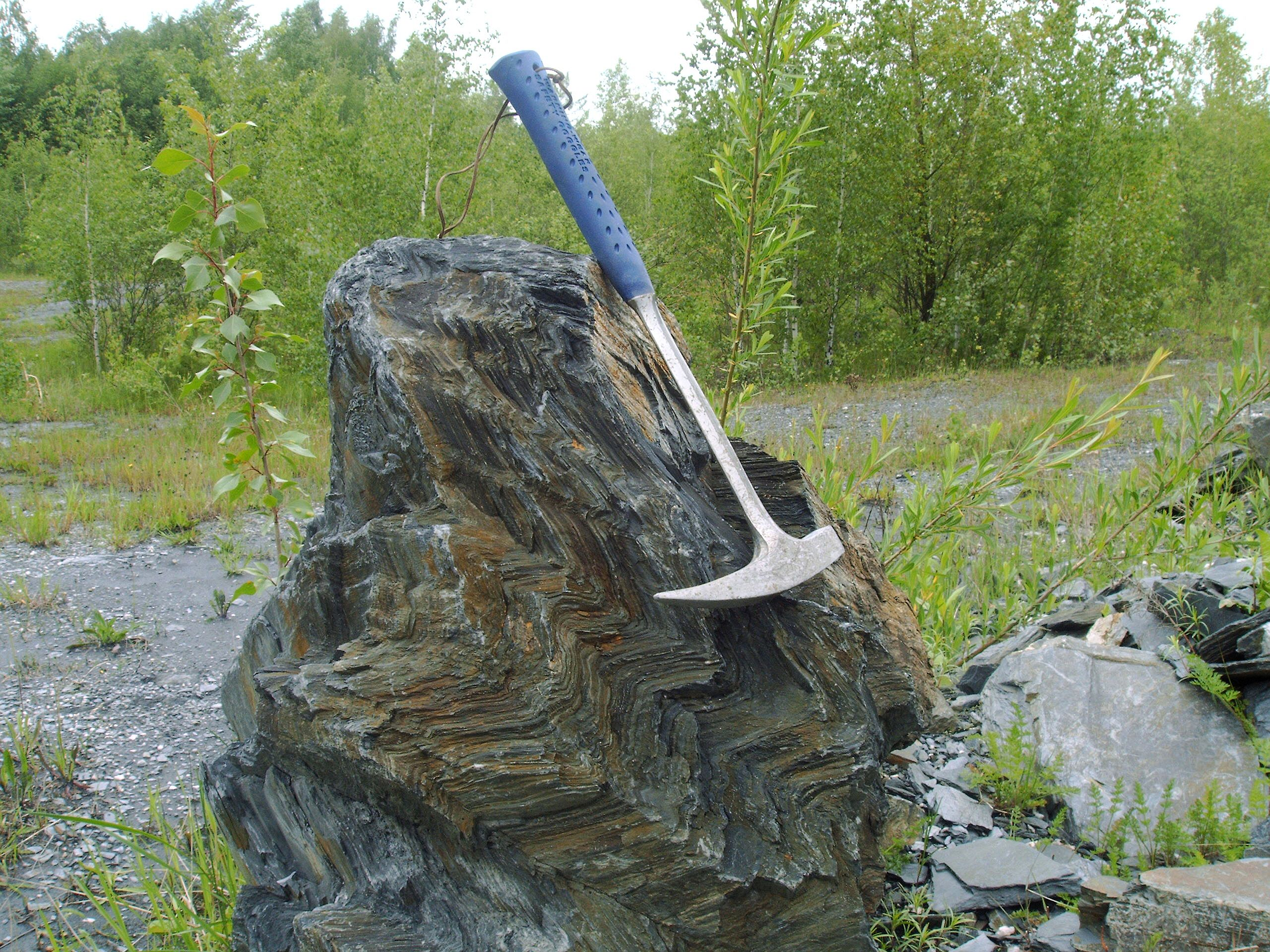 Zdjęcie fałdów z płynięcia powstałych w zmetamorfizowanych metapyłowcach. Kopalnia Dewon, Jarnołtówek, Góry Opawskie.